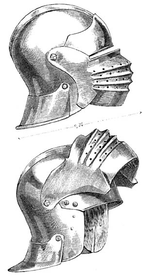 Bellows Visored Sallet by Eugène Emmanuel Viollet-le-Duc